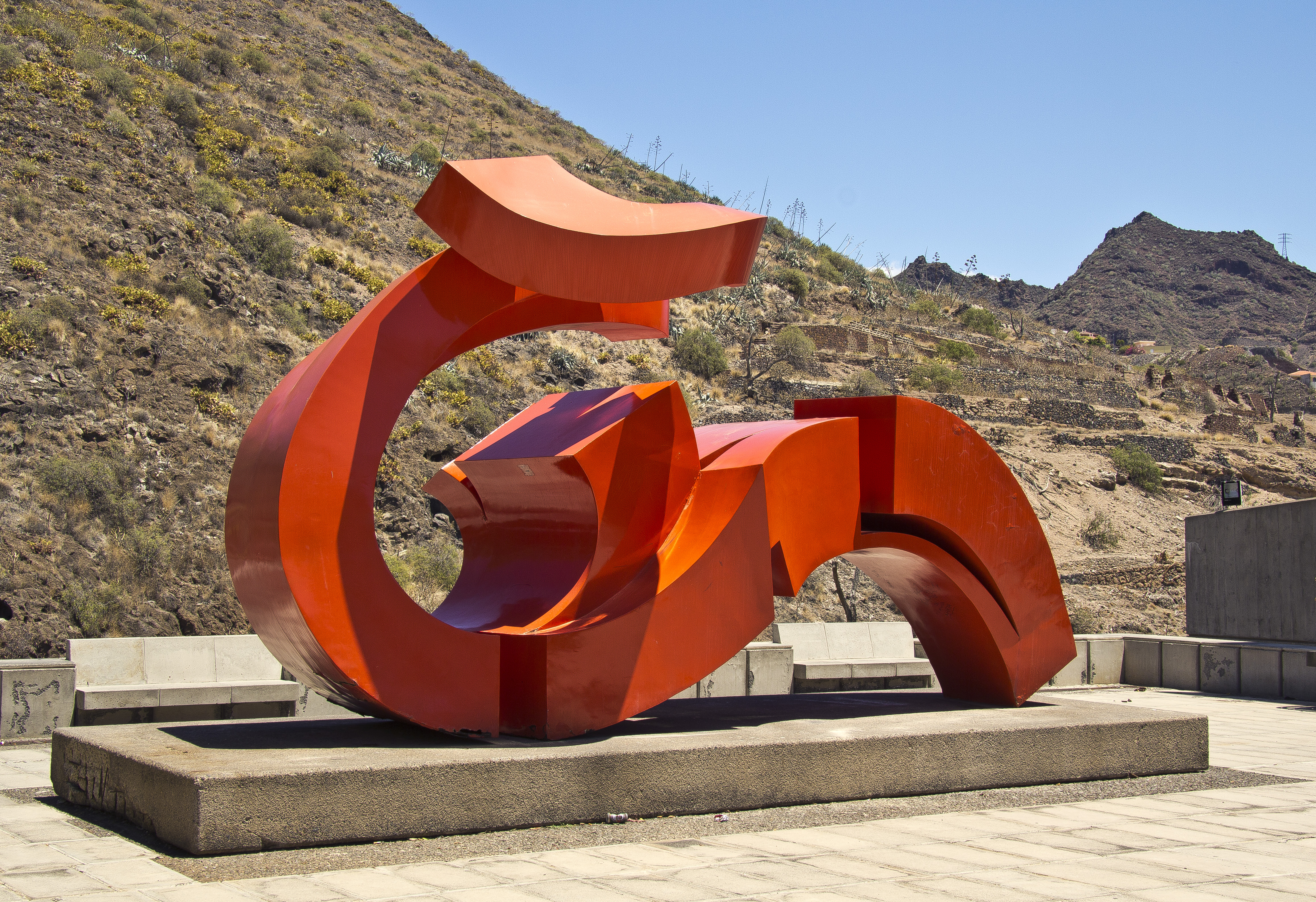 Die Plastik aus lackiertem Eisen wurde von dem in Las Palmas de Gran Canaria geborenen Künstler Martín Chirino López 1972 geschaffen. Sie wurde 1973 im Rahmen der Initiative „Escultura en la Calle“ der Architektenkammer der Kanarischen Inseln auf der Plaza Alberto Sartoris aufgestellt. Die Plastik hat die Maße 332x750x290 cm